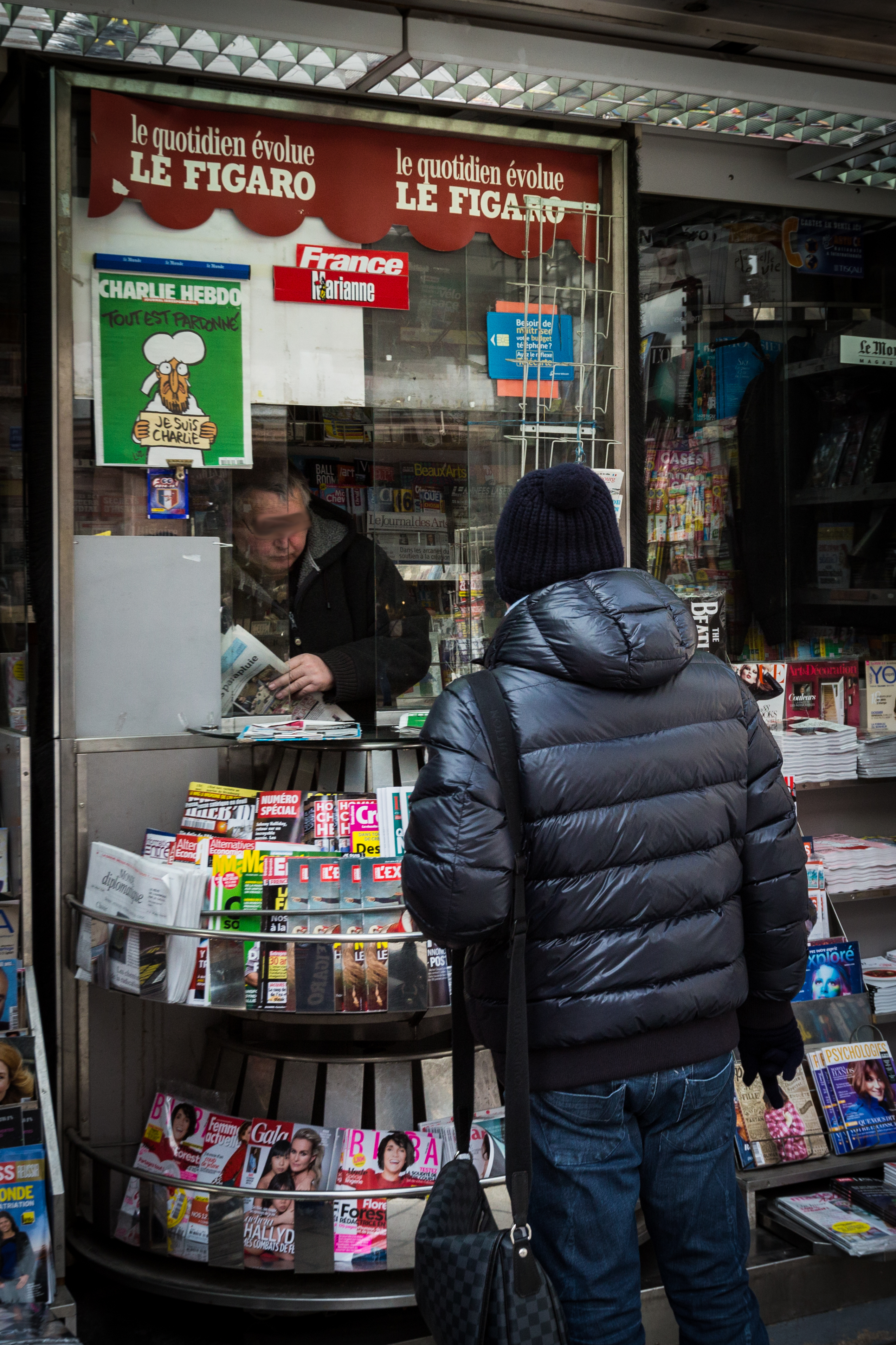 Strasbourg kiosque à journaux 31 janvier 2015